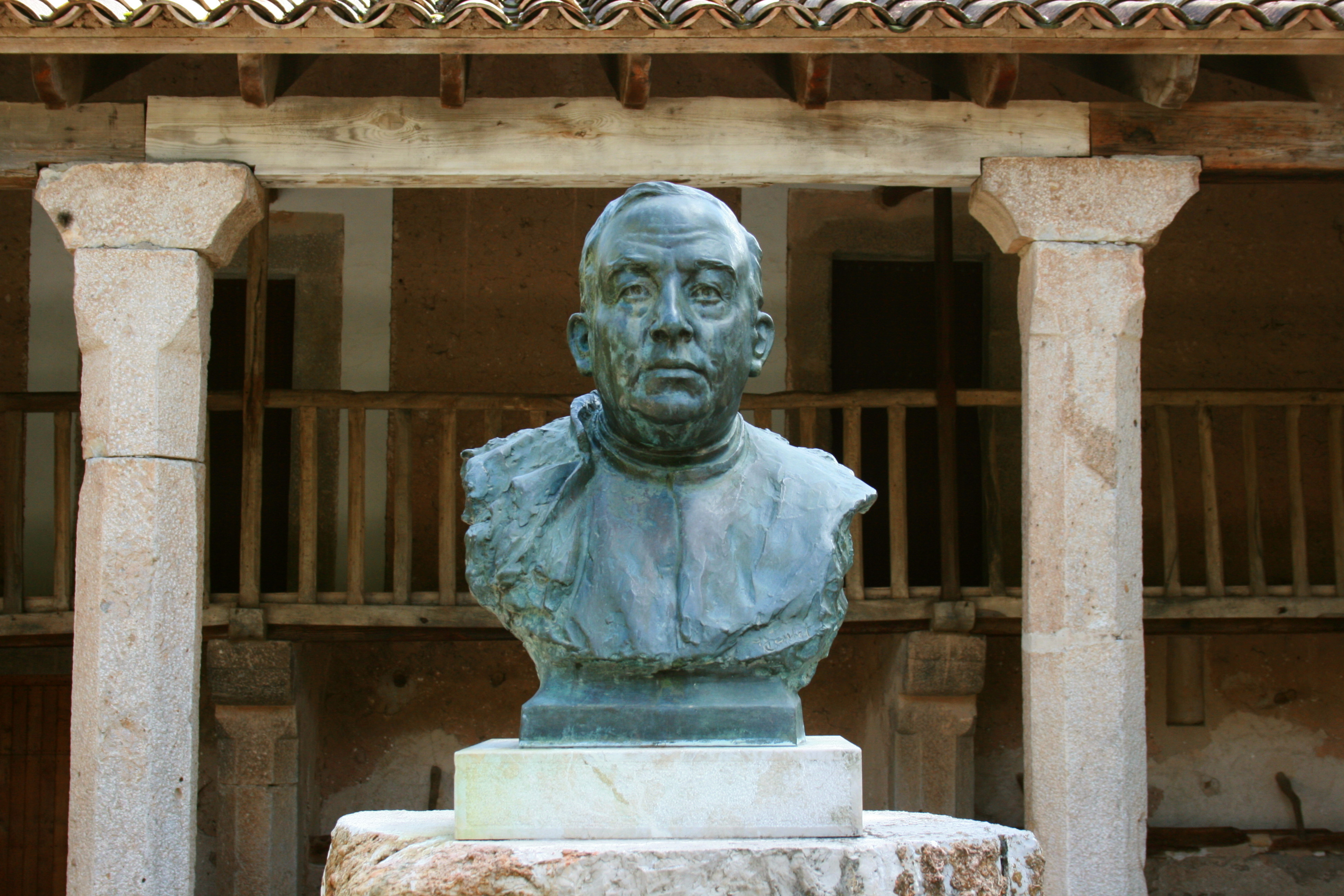 Bust of Miguel Costa i Llobera, Santuari de Lluc in Escorca, Mallorca